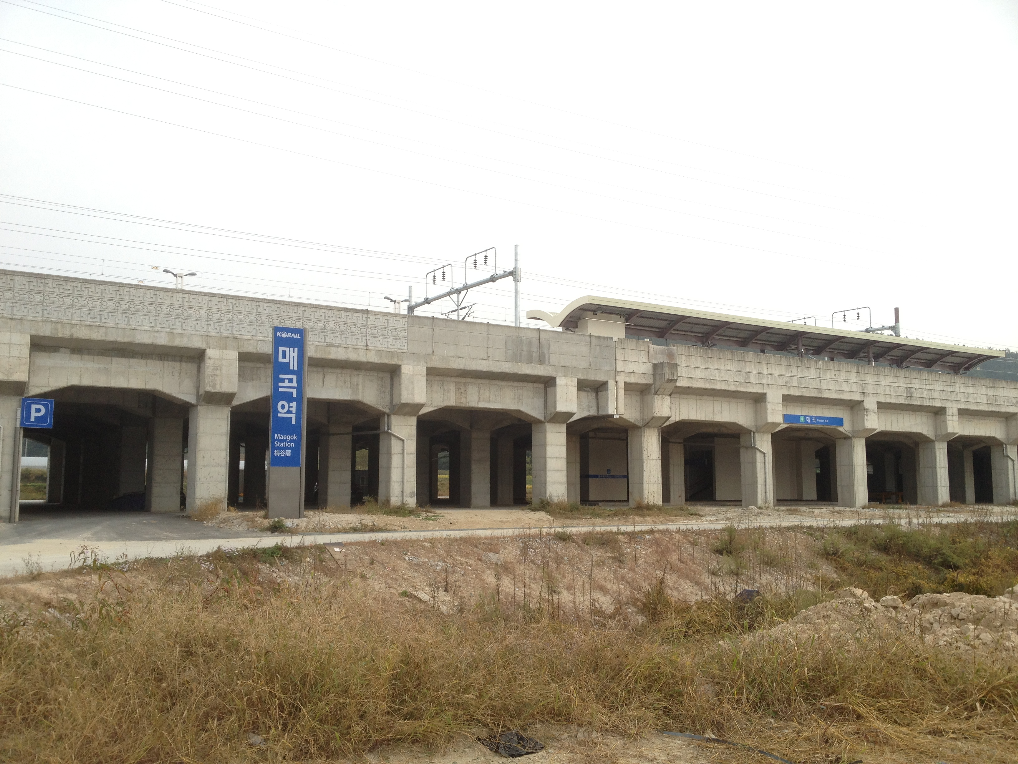 매곡역 전경